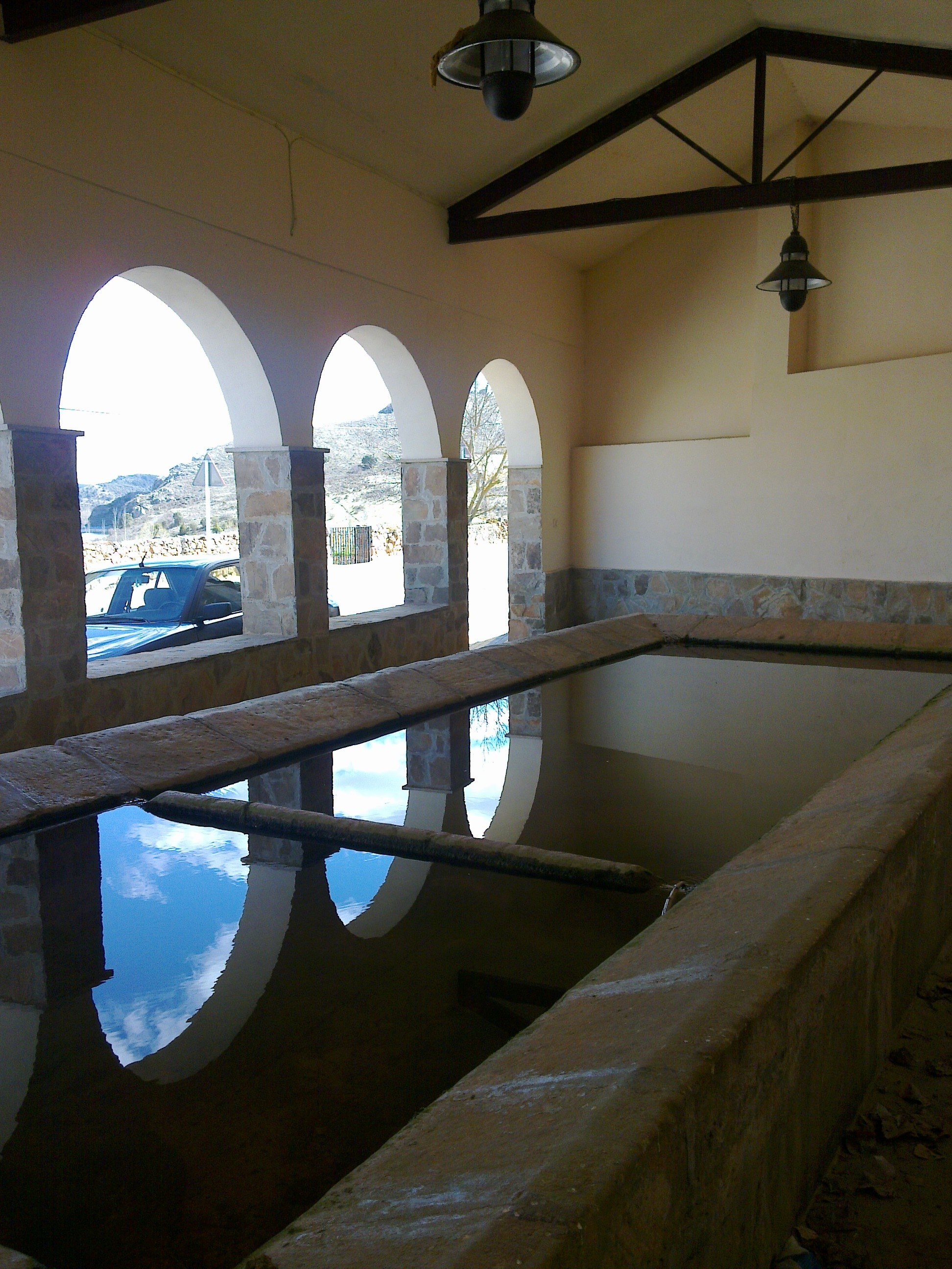 Garbitokia.